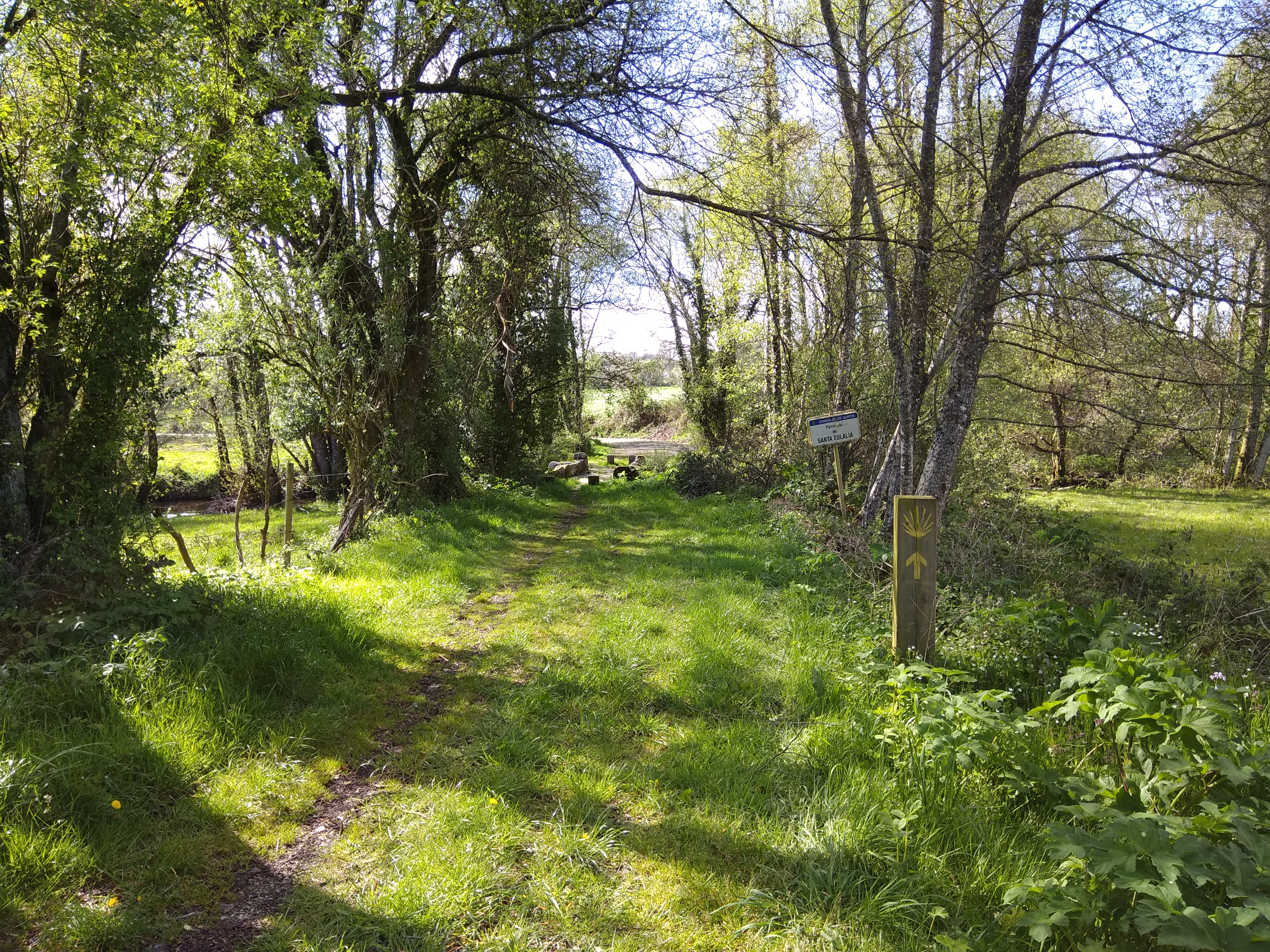 Ponte Marzá, sobre o Mandeo, Curtis, Galiza.